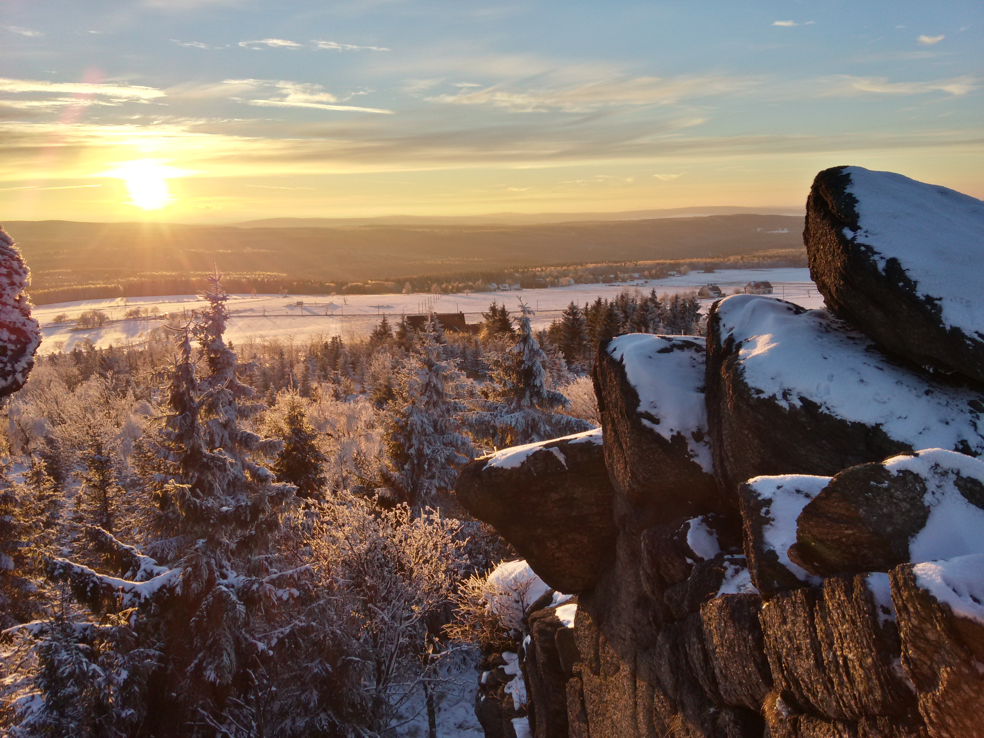 Eduardova skála při západu